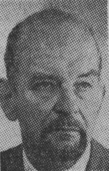 Inredningsarkitekten Eyvind Beckman